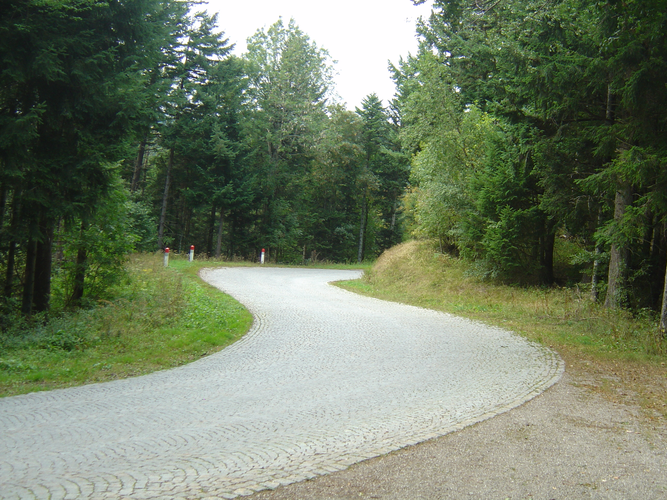 Montée du col du Grand Ballon (parc naturel régional des Ballons des Vosges). Deuxième portion pavée après le col Amic.